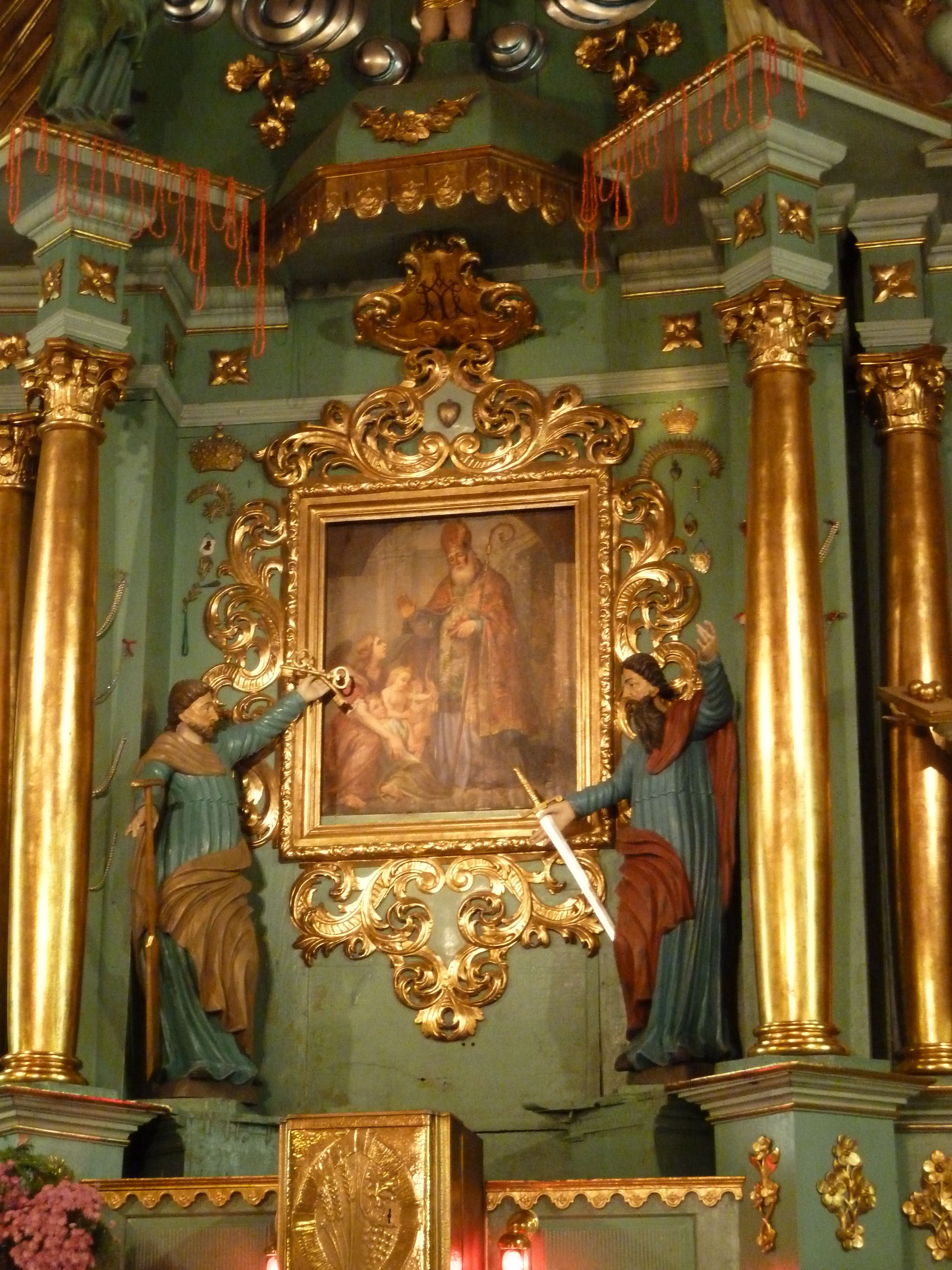 Obraz św. Mikołaja w ołtarzu głównym kościoła parafialnego w Truskolasach